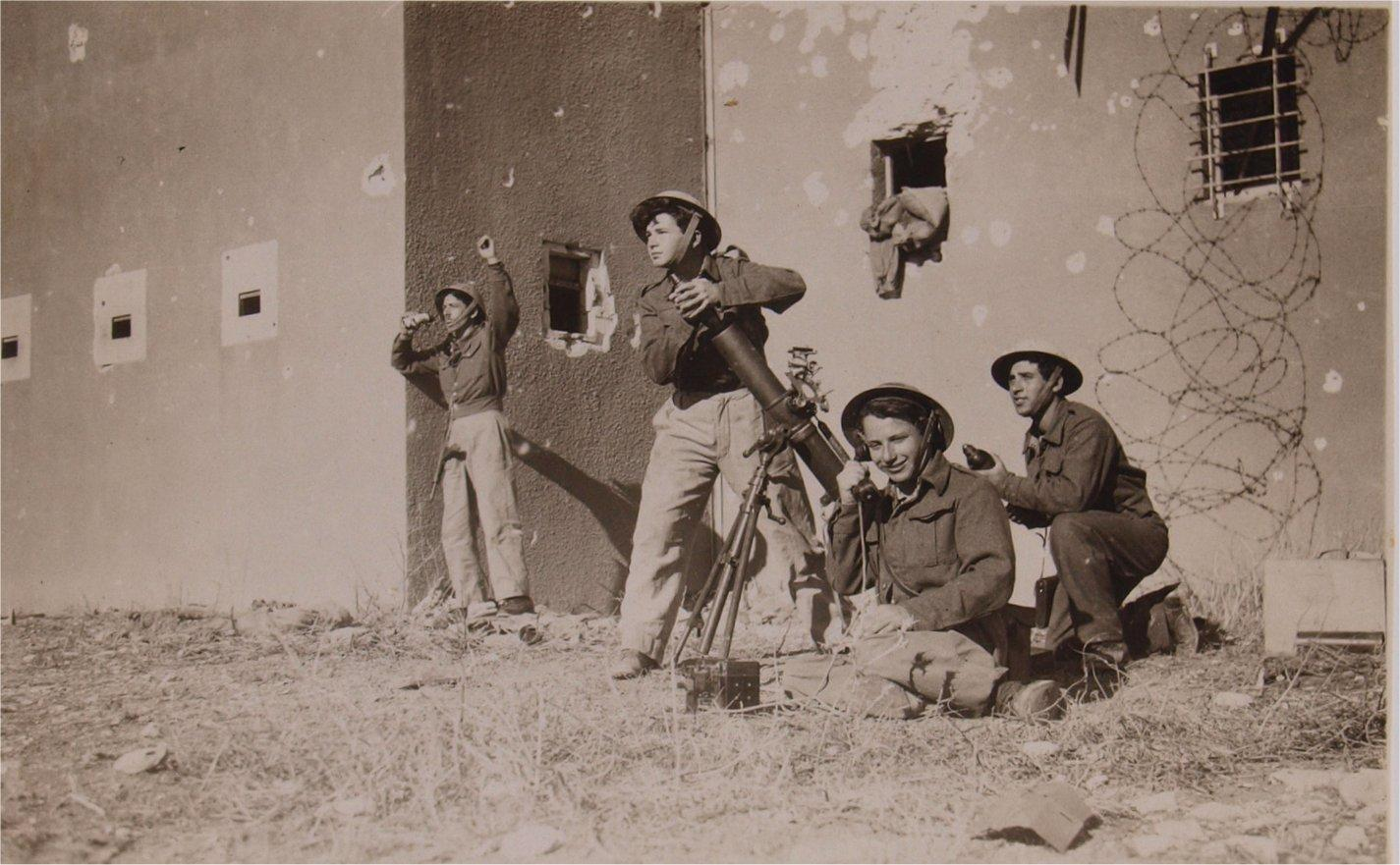 המחלקה של אבא מגדוד ברק בגולני, השתתפה בקרבות של עמק הירדן במלחמת השחרור, בזמןהפוגה ראשונה מתאמנת ושומרת על משטרת גשר